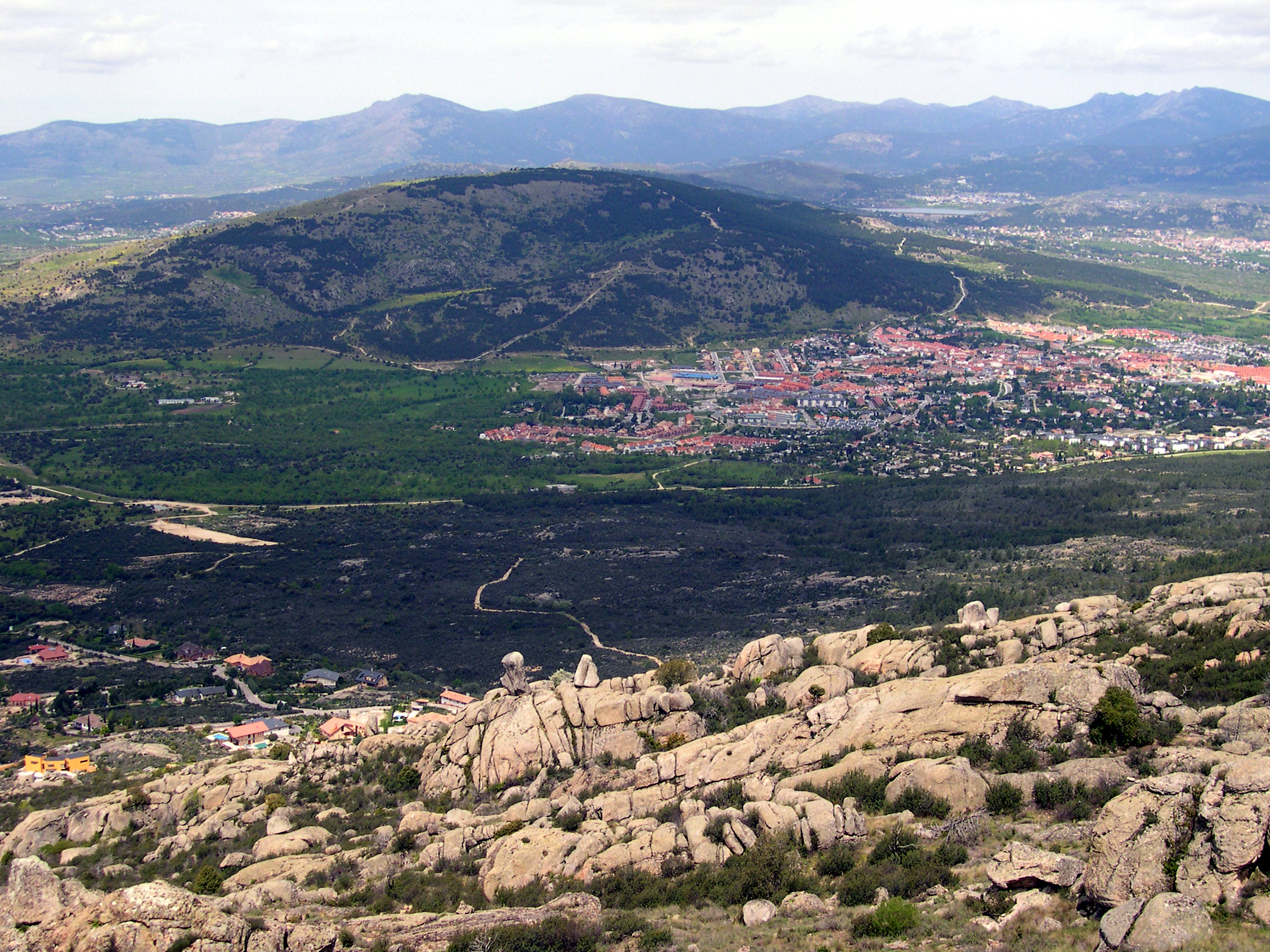 Vista de Cabeza Mediana desde Canto Hastial